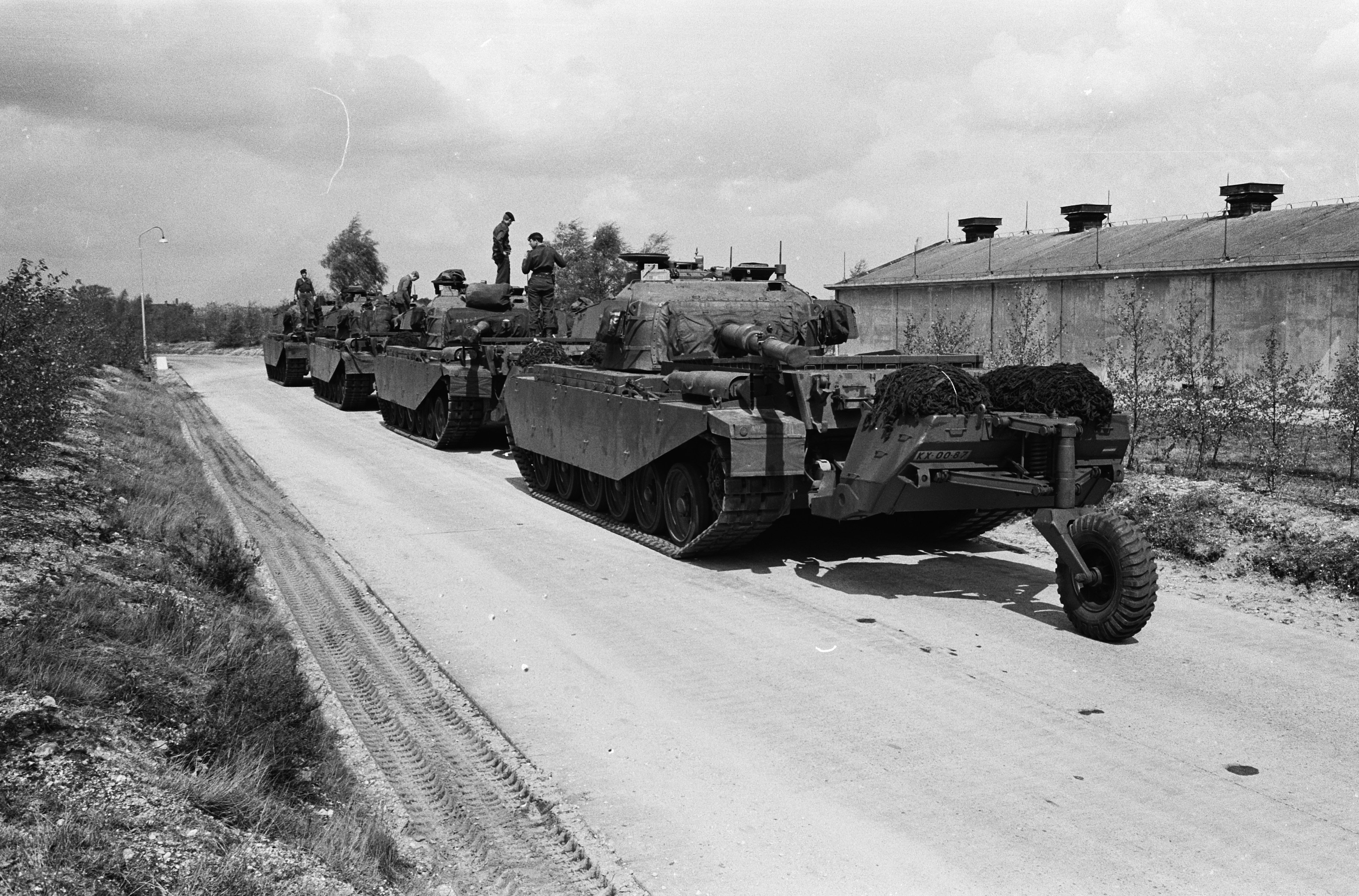 Collectie / Archief : Fotocollectie Anefo Reportage / Serie : [ onbekend ] Beschrijving : Proefmobilisatie Cavalerie (Tankescadron) de tanks klaar om uit te rukken Datum : 2 mei 1963 Trefwoorden : CAVALERIE, Proefmobilisaties, TANKS Fotograaf : Broers, F.N. / Anefo Auteursrechthebbende : Nationaal Archief Materiaalsoort : Negatief (zwart/wit) Nummer archiefinventaris : bekijk toegang 2.24.01.05 Bestanddeelnummer : 915-1143